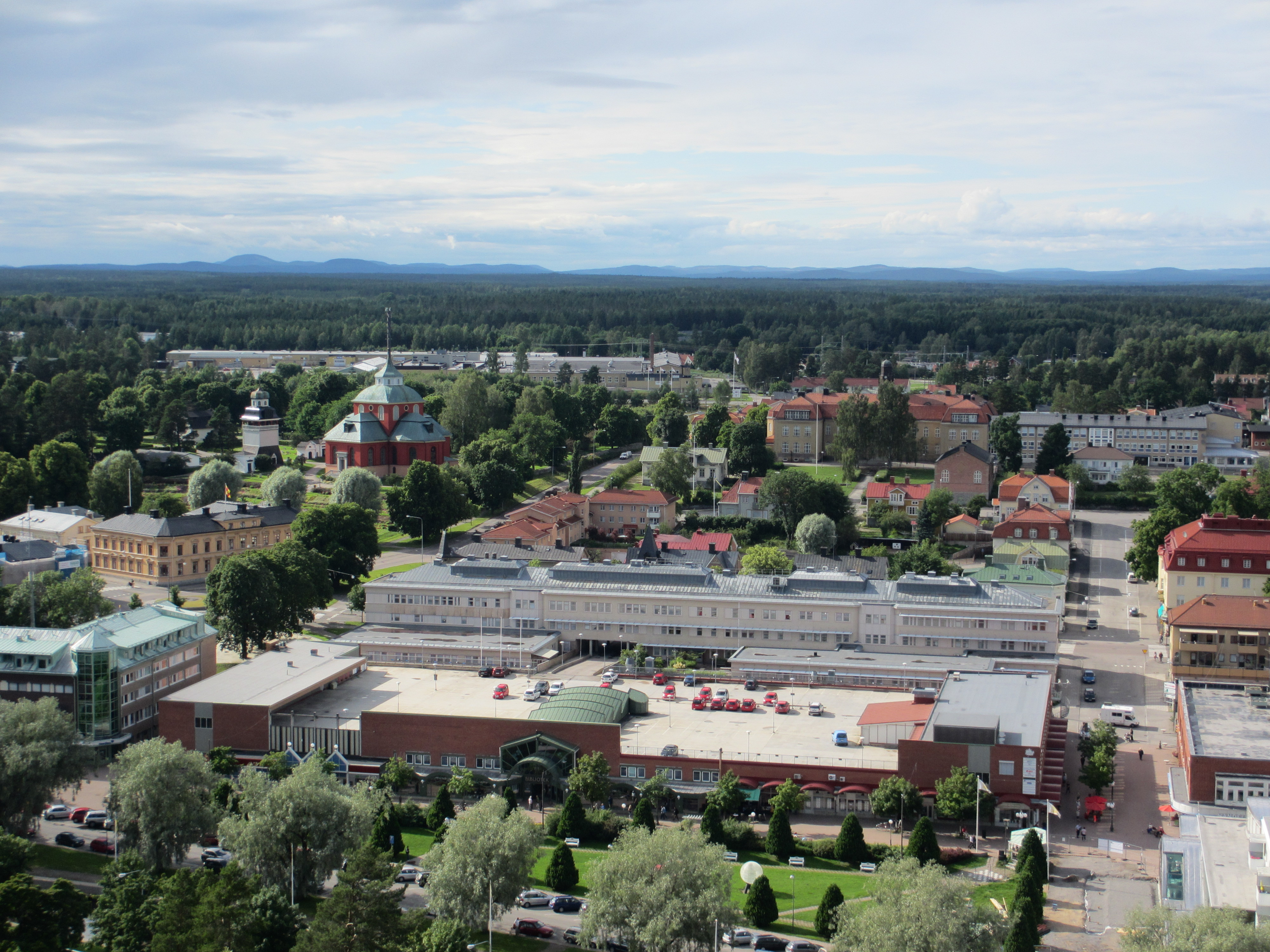 Vy från Oscarsborg, Söderhamn